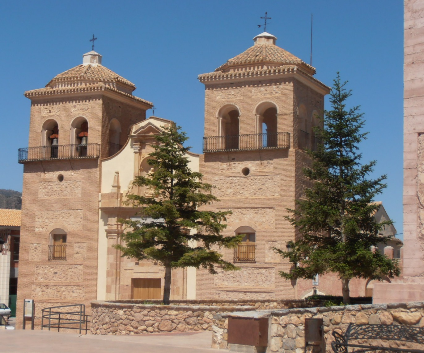 Aledo: Iglesia Sta María la RealAt the pictures right border: Torre de Homenaje